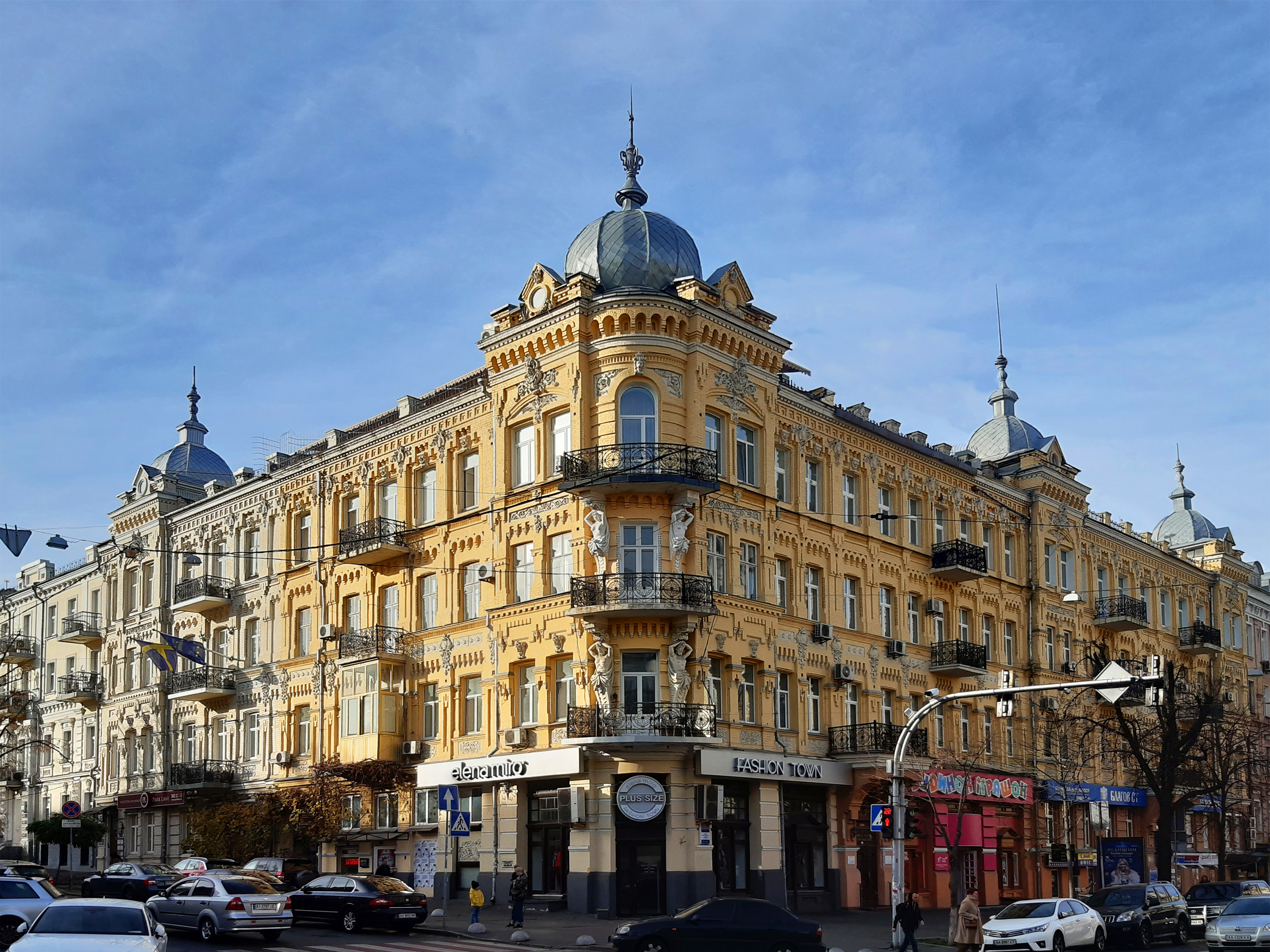 Будинок Гольденберга, Київ, вул. Богдана Хмельницького, 33/34